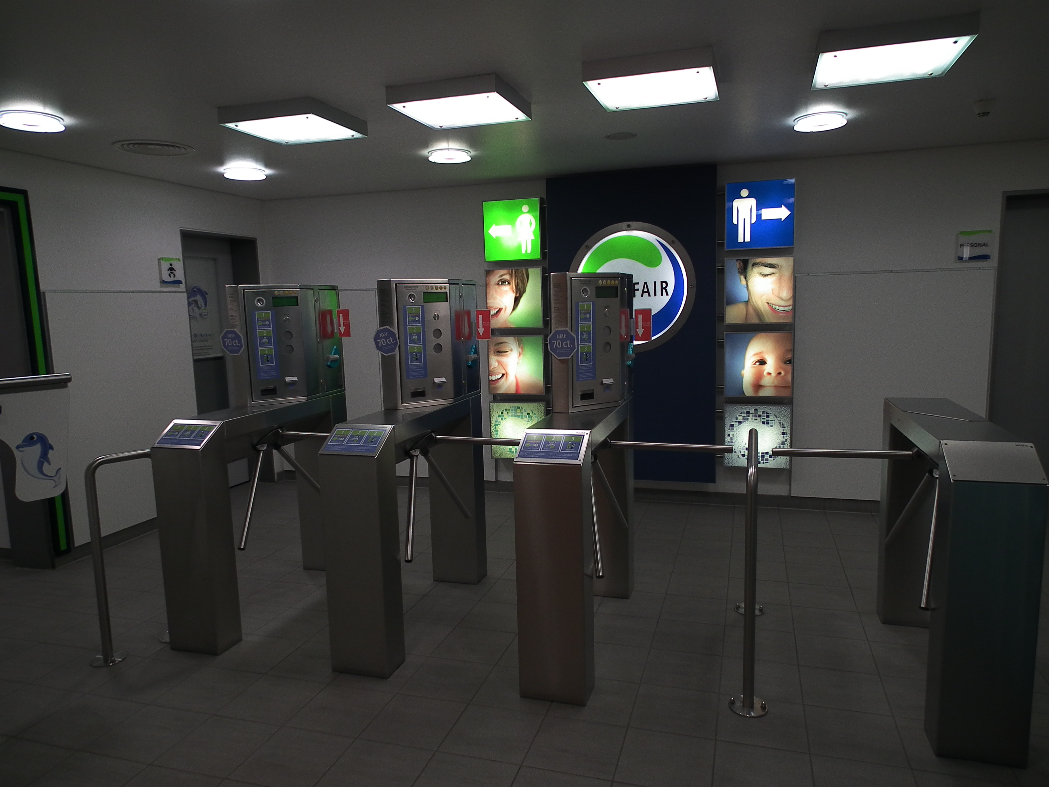 Zugangsanlage zum Sanitärbereich "Sanifair" in der Autobahnraststätte Hunsrück Ost (Rheinland-Pfalz, Deutschland)